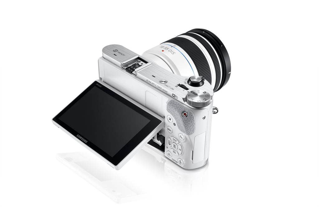 Samsung NX300 camera.